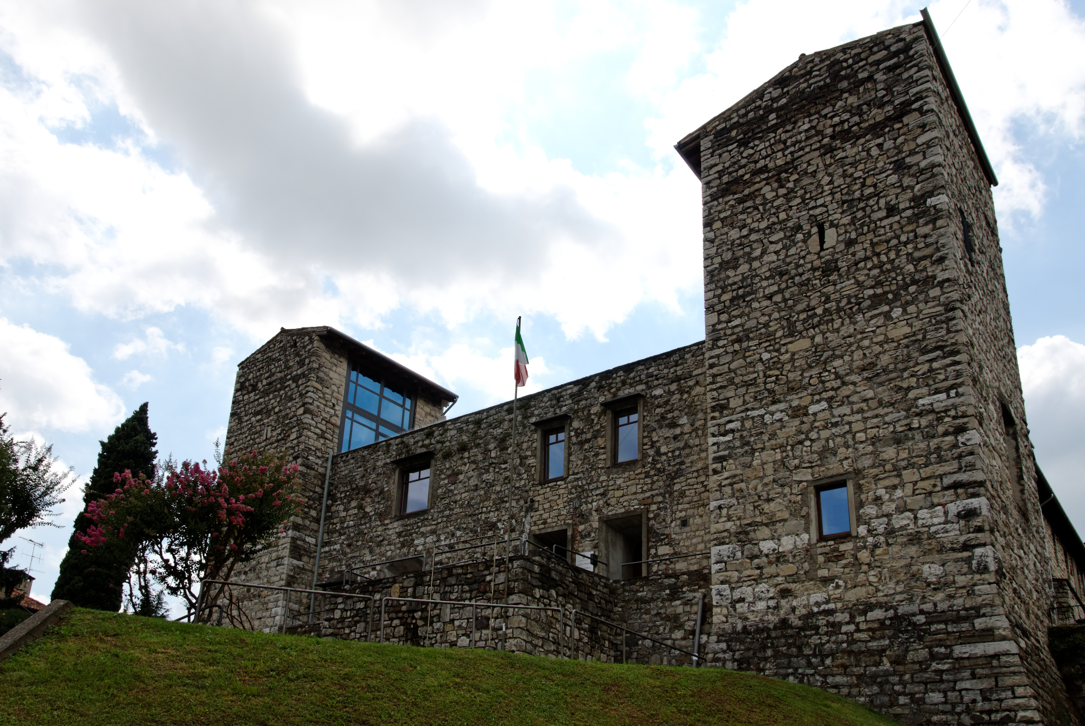 Iseo (BS)